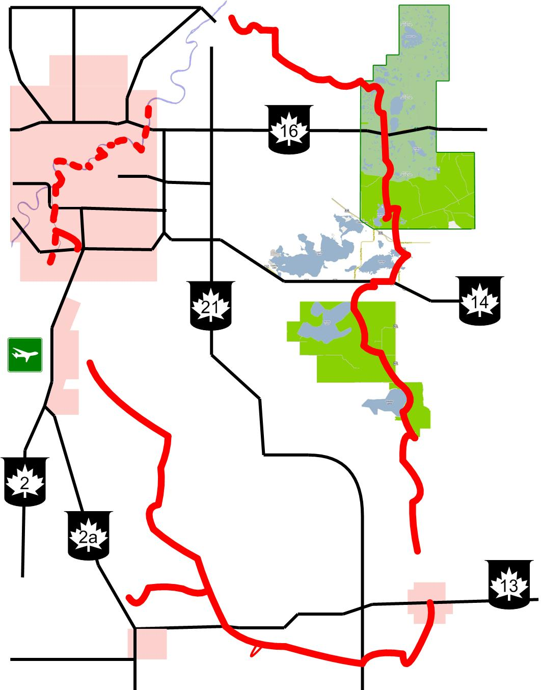 Waskahegan Trail Map